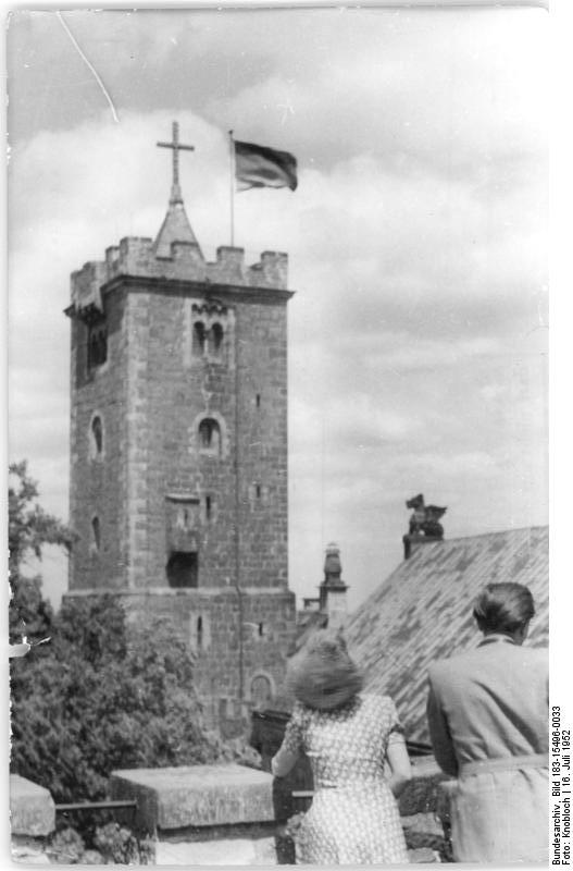 Eisenach, Wartburg, Bergfried Zentralbild Knobloch 16.7.1952 Mit dem FDGB-Feriendienst unterwegs. Durch Omnibusfahrten, die der FDGB-Feriendienst veranstaltet, haben unsere Urlauber Gelegenheit, die nähere und weitere Umgebung ihres Ferienaufenthaltes kennenzulernen und auch kulturhistorisch wertvolle Bauten zu besichtigen. UBz: Eisenach. Ein Blick vom alten Pulverturm auf den Turm der Wartburg.